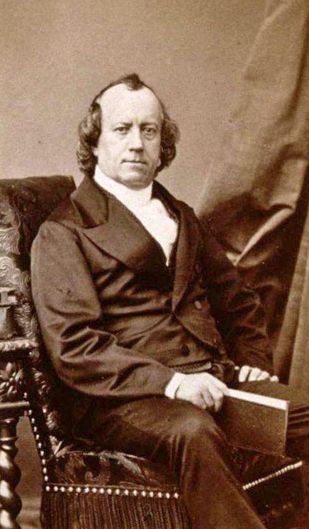 Baum Joh. Wilhelm, theol. 1872. Bibliothèque nationale et universitaire de Strasbourg.